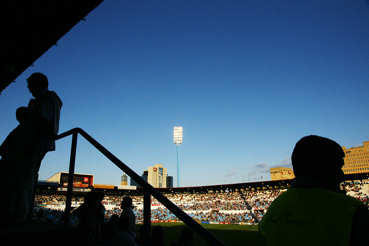 la romareda